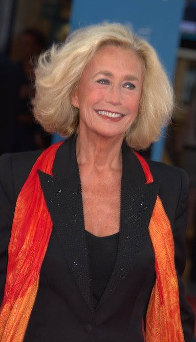 Brigitte Fossey au festival de Deauville